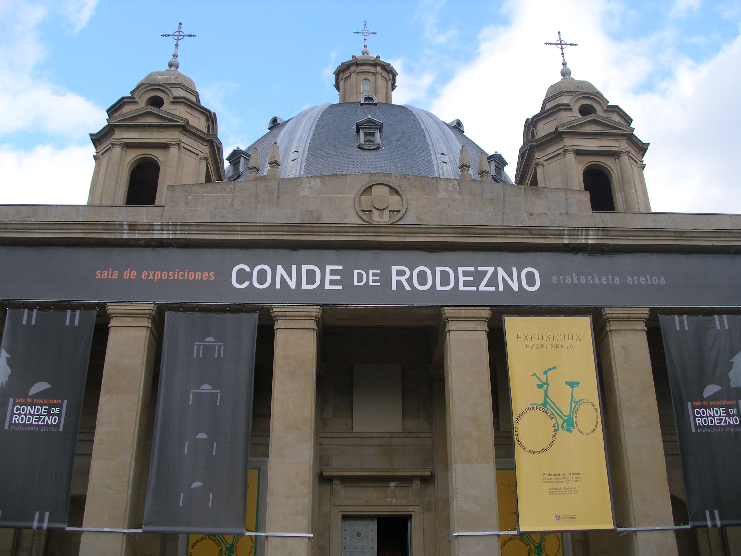 Vista frontal del monumento a los Caidos